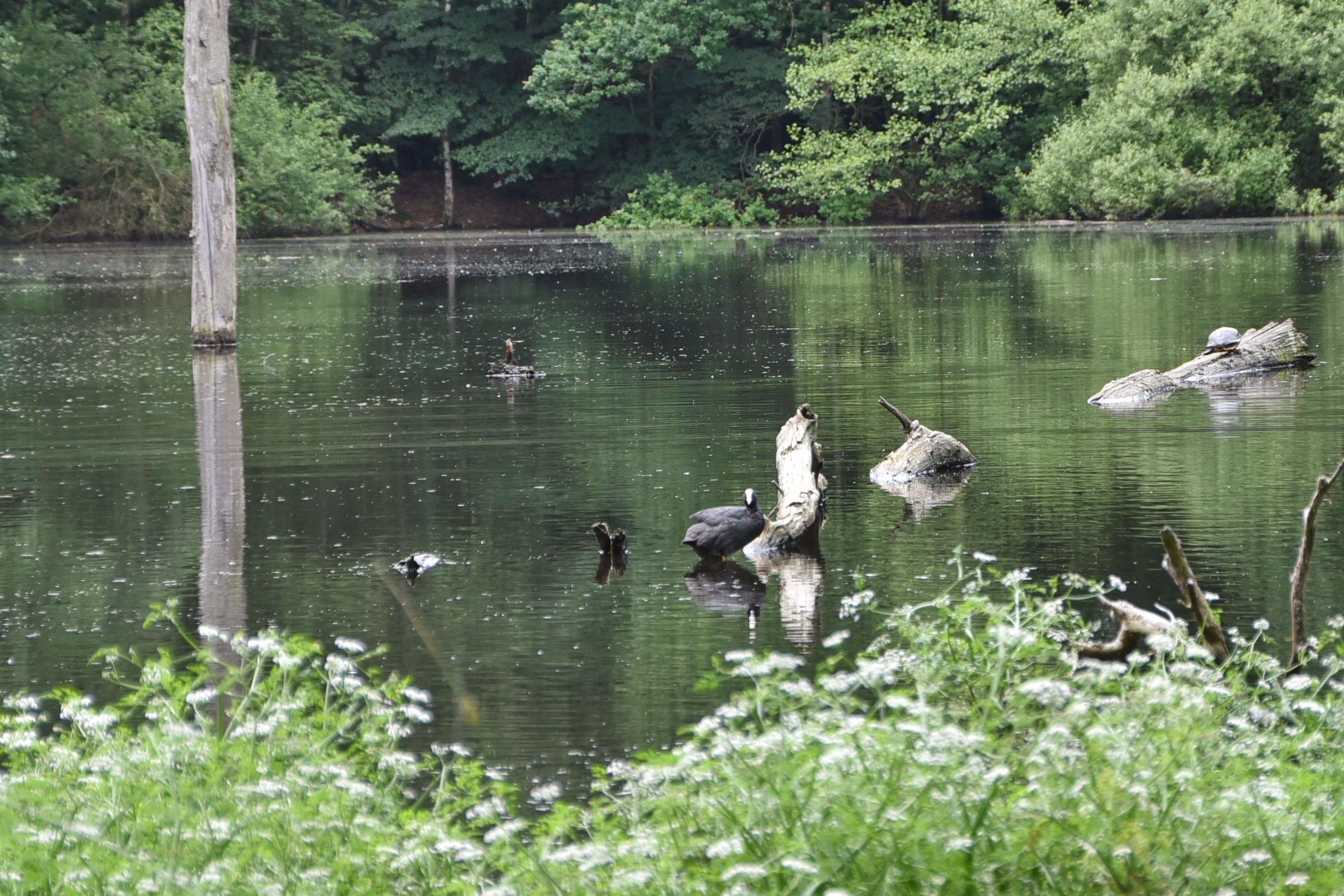 Teich am NSG Nachtweide von Patershausen